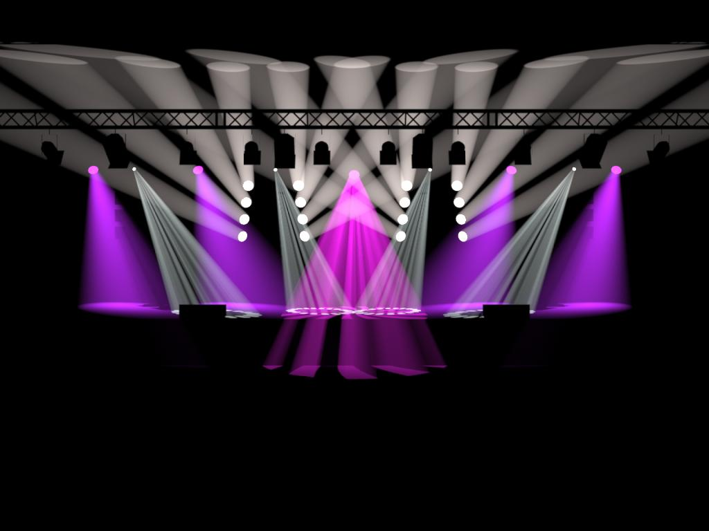 Création lumière sous wysiwyg